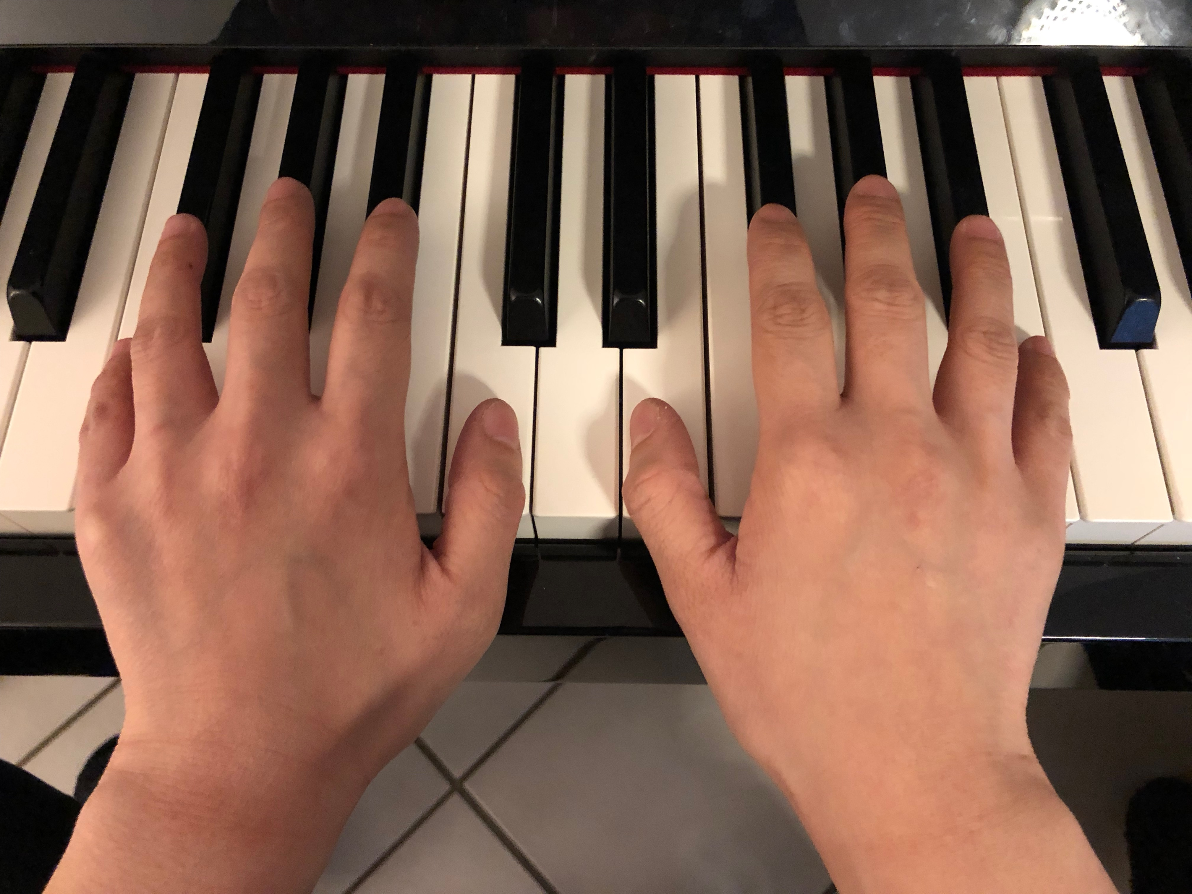 Referenzposition der Hände nach Chopin; Hände der chinesischen Konzertpianistin Ran Deng